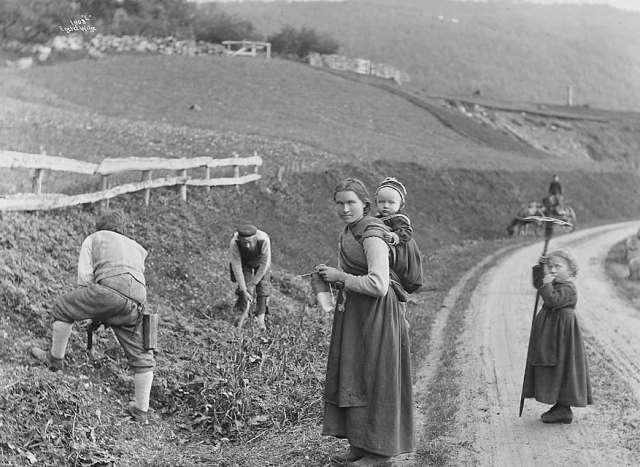 Mäharbeiten am Wegesrand um 1890 in Norwegen.